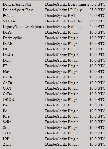 Список цен